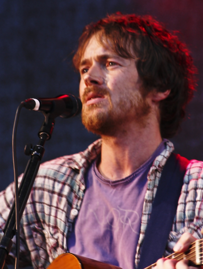 Damien Rice durante show em Giske, Noruega.